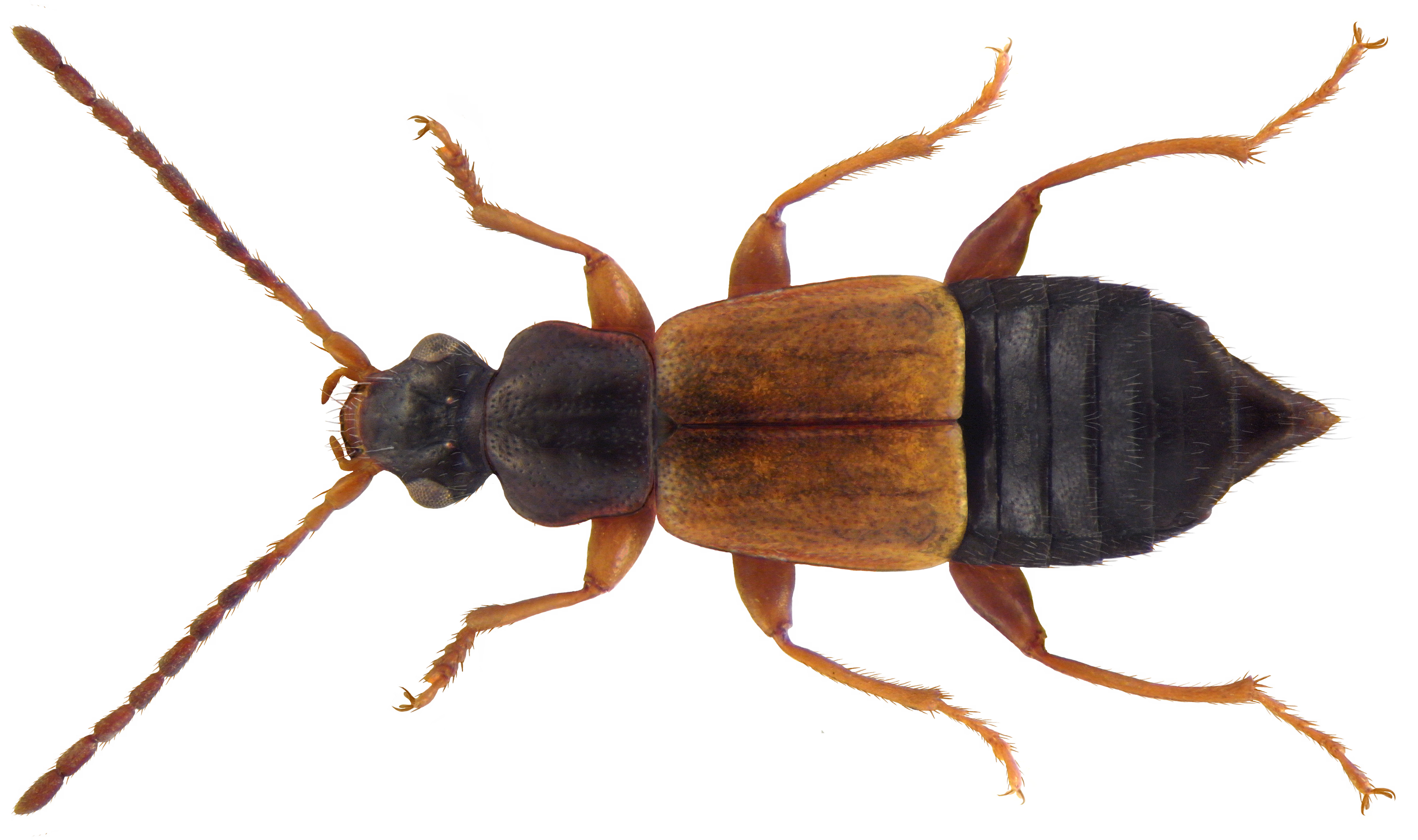 Familie: Staphylinidae Groesse: 4,5-5 mm Verbreitung: Europa Oekologie: in höheren Gebirgen auf Blüten Fundort: Austria, Tirol, Ötztaler Alpen, Pitztal, 1600 m leg.det. U.Schmidt, 1983 Photo: U.Schmidt, 2010